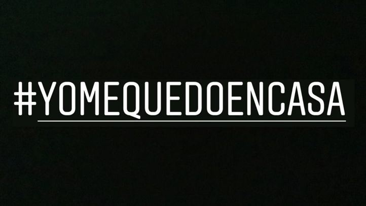 Mensaje de #Yomequedoencasa ante las cuarentenas mundiales por COVID-19